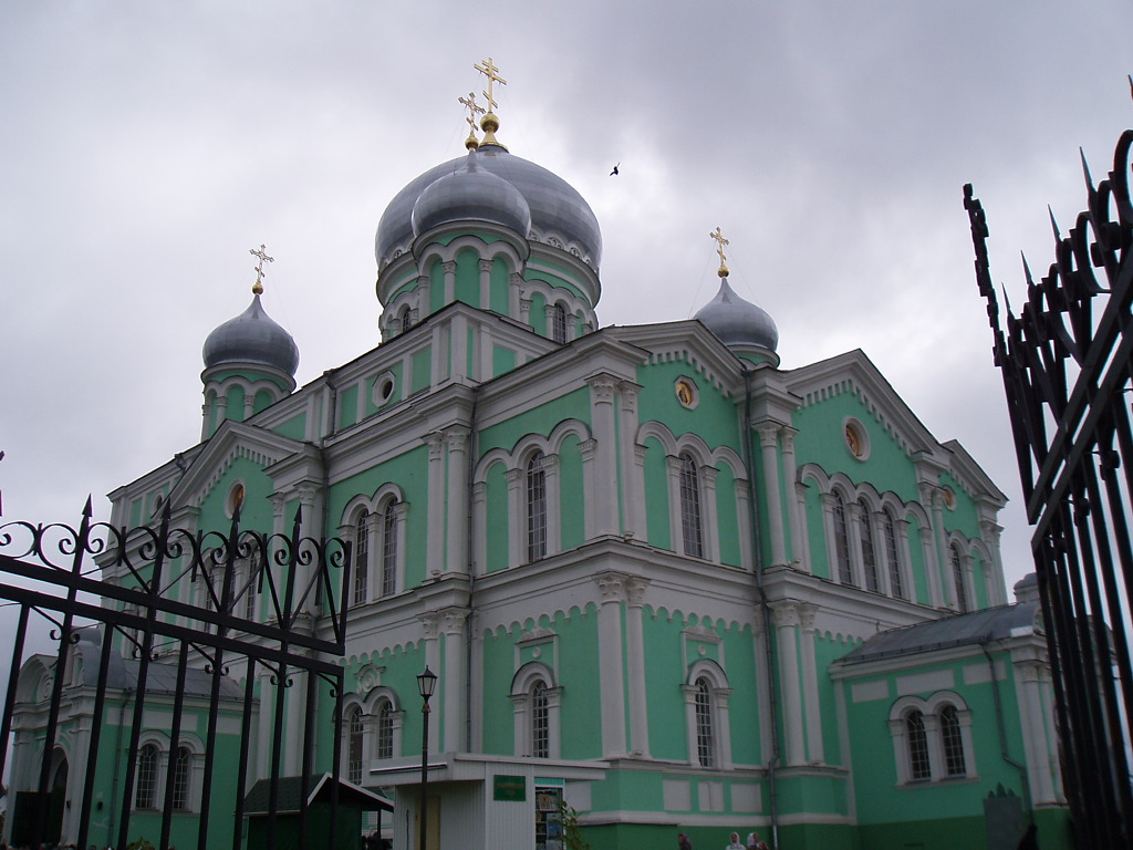 Троицкий собор Серафимо-Дивеевского монастыря